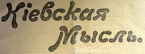 Логотип газеты "Киевская мысль" (1906-1918)